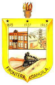 Escudo del municipio de Frontera, Coahuila